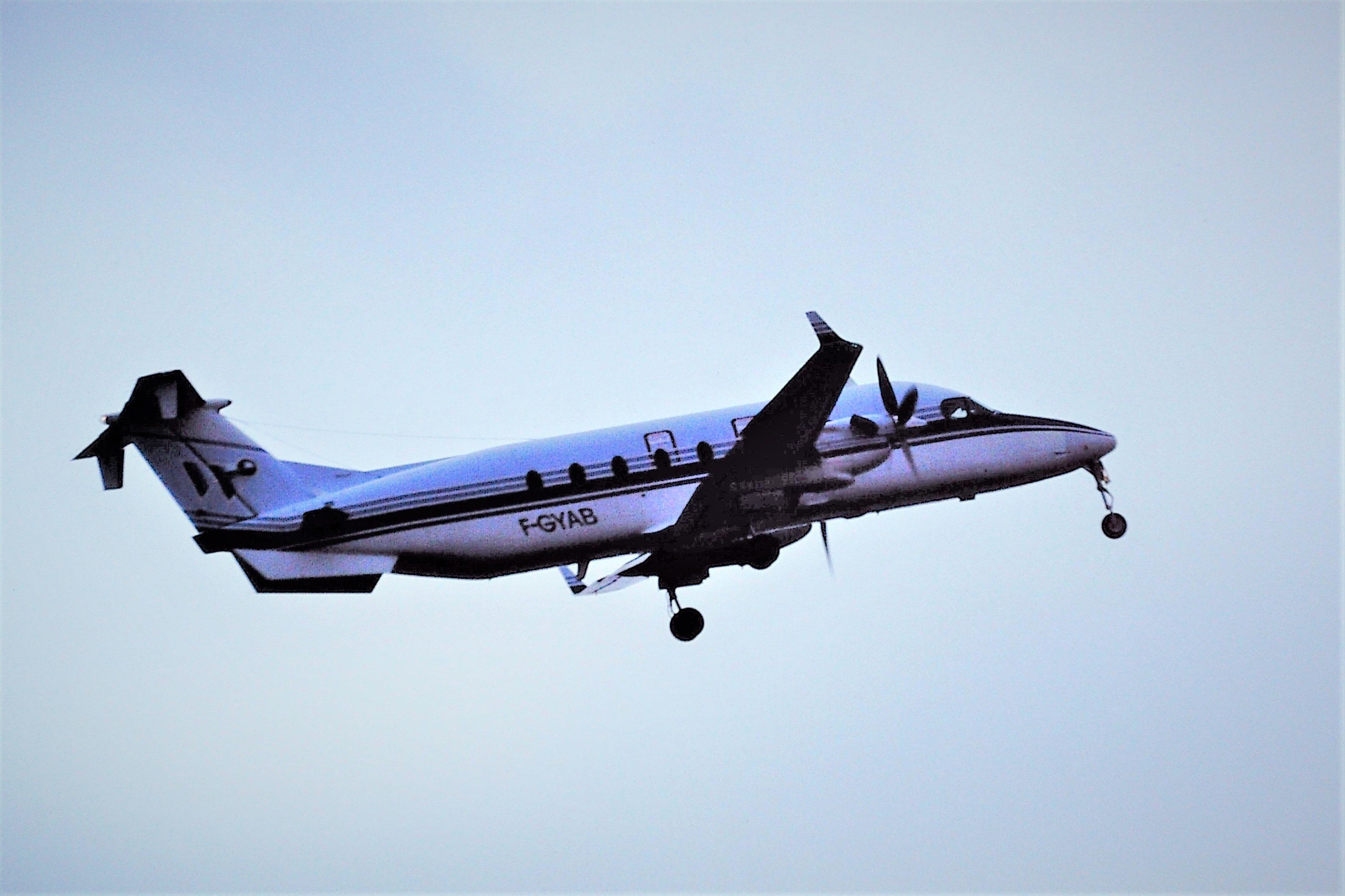 F-GYAB Beech 1900 Air Bretagne Jersey 15-08-2000